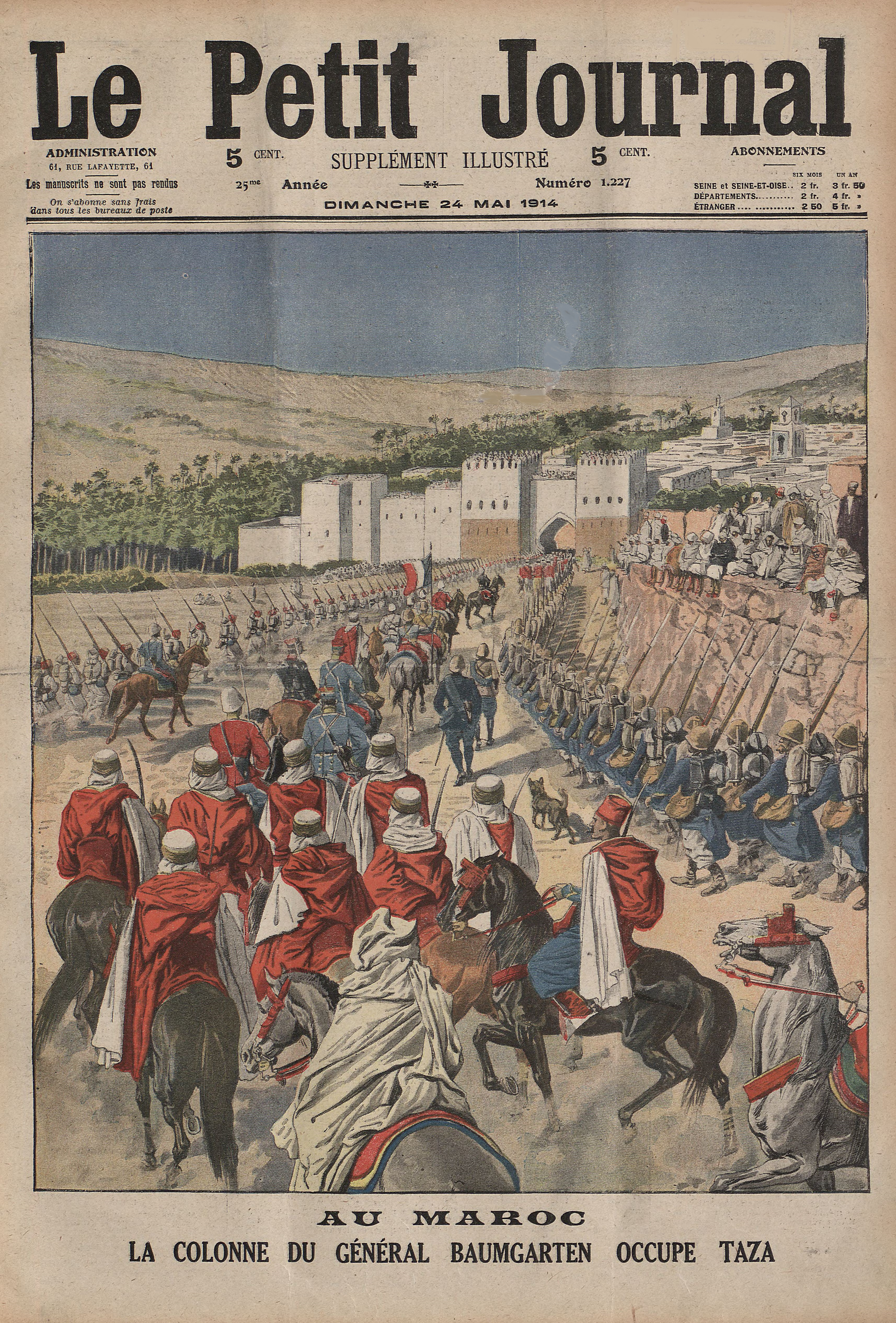 Le Petit Journal - Au Maroc, la colonne du général Baumgarten occupe Taza.